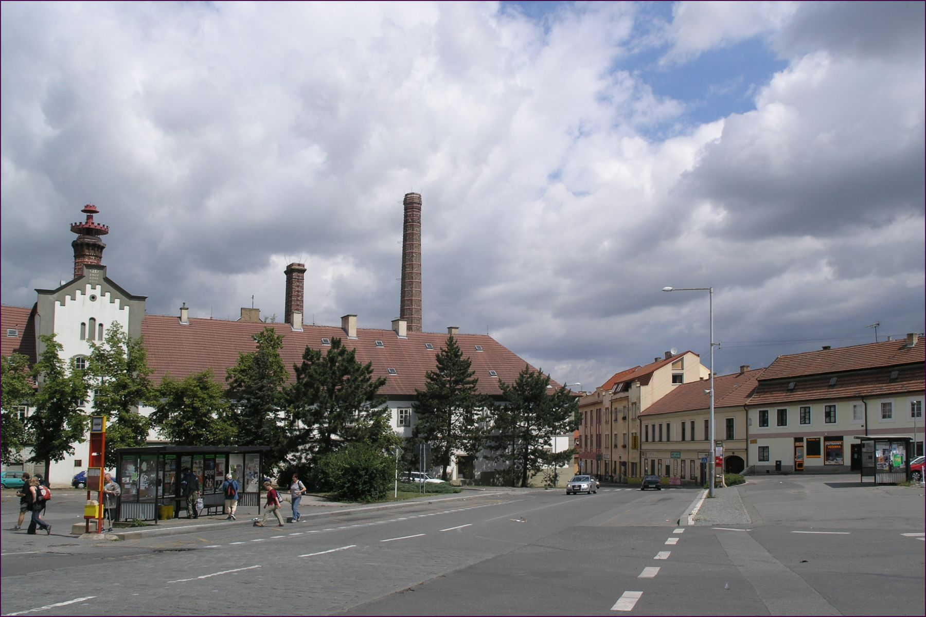 Praha, Zbraslav - náměstí